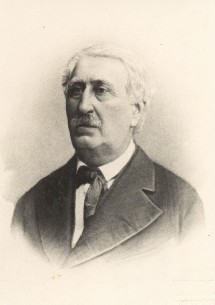 Josef Jaroslav Král (1877 1914 Český malíř, krajinář.